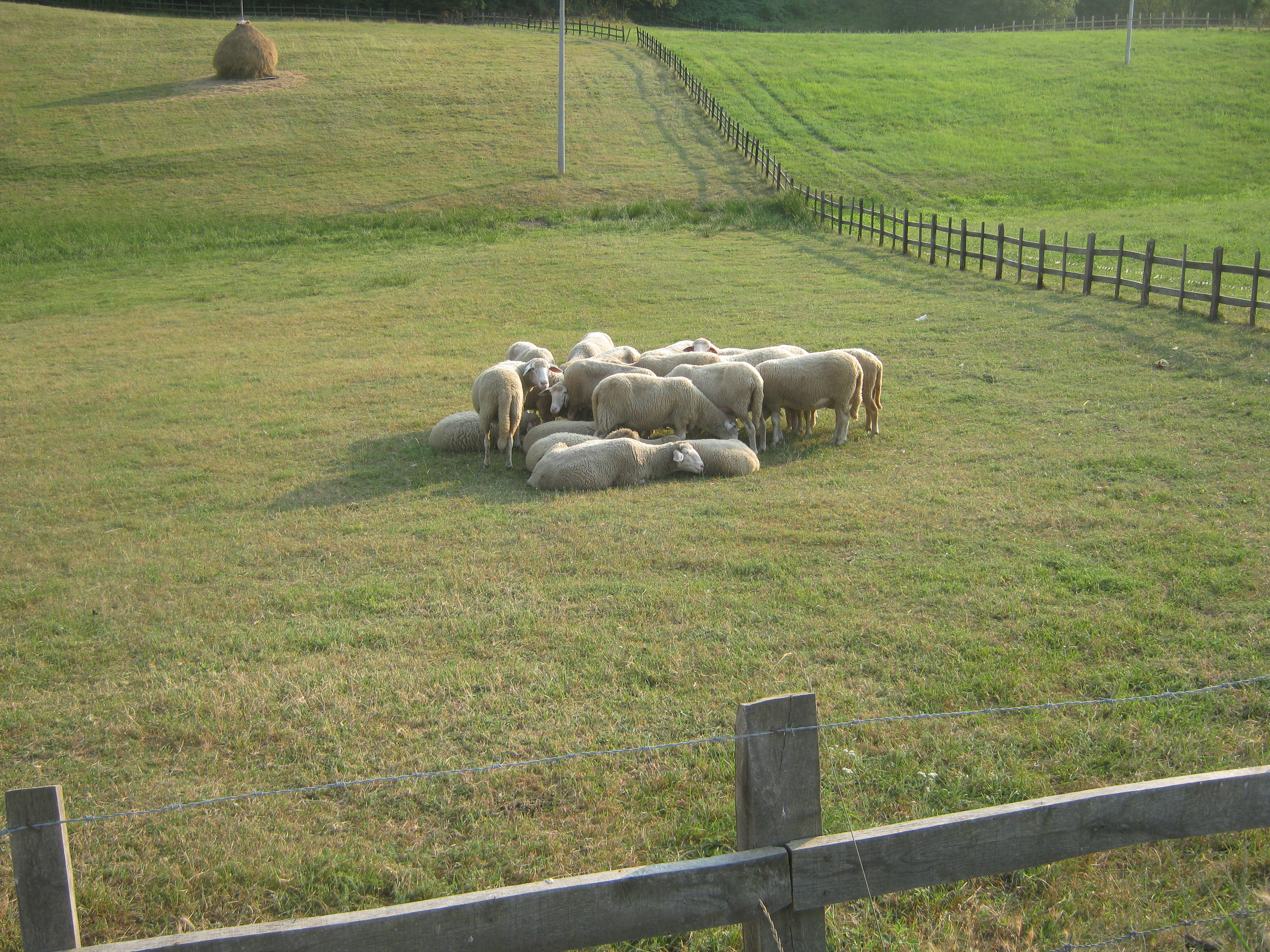 Ovce na ispaši u Šaranima.